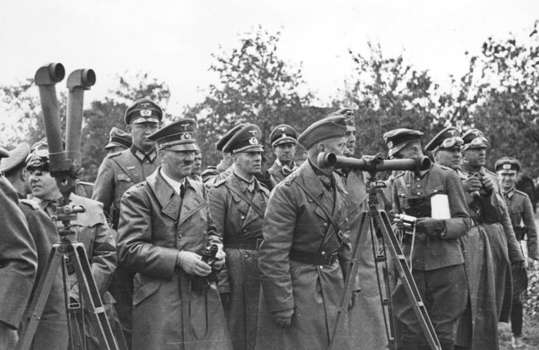 Polenfeldzug.- Martin Bormann, Adolf Hitler, Erwin Rommel und Walter von Reichenau mit Feldstechern und Scherenferngläsern; PK 637 (Ost)